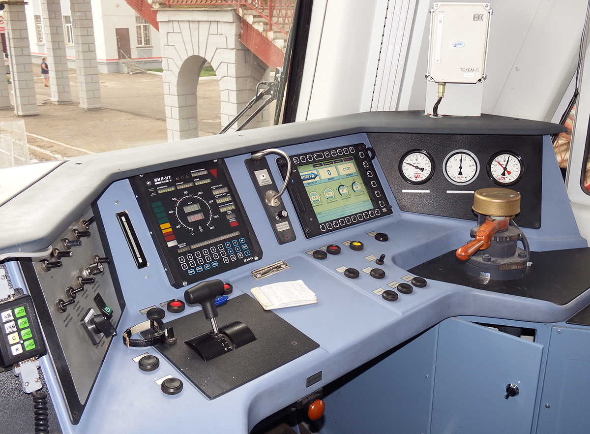 Пульт машиниста в кабине тепловоза 2ТЭ25КМ-0025